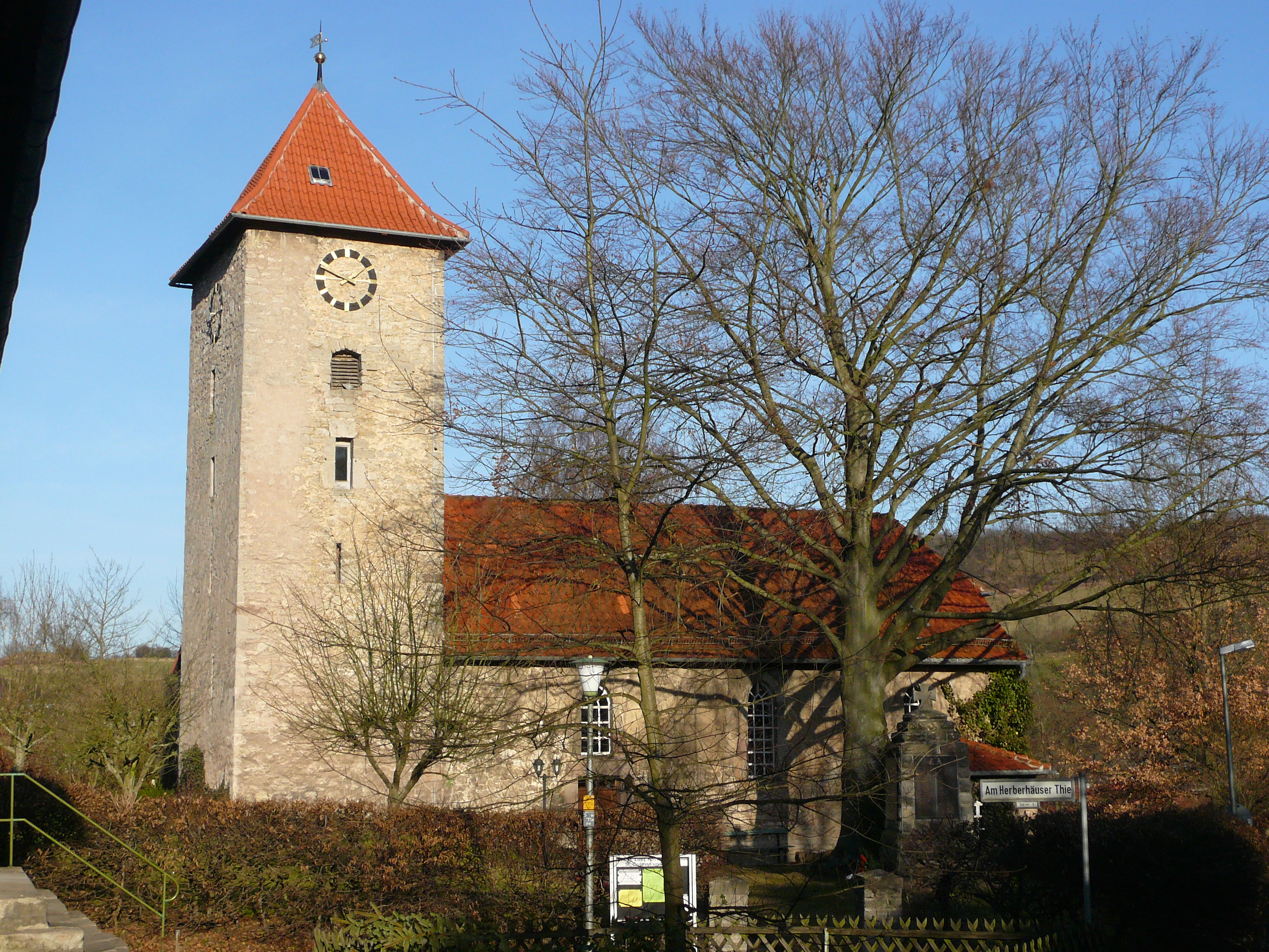 Ev.-luth. Kirche St. Cosmas und Damian, Göttingen-Herberhausen